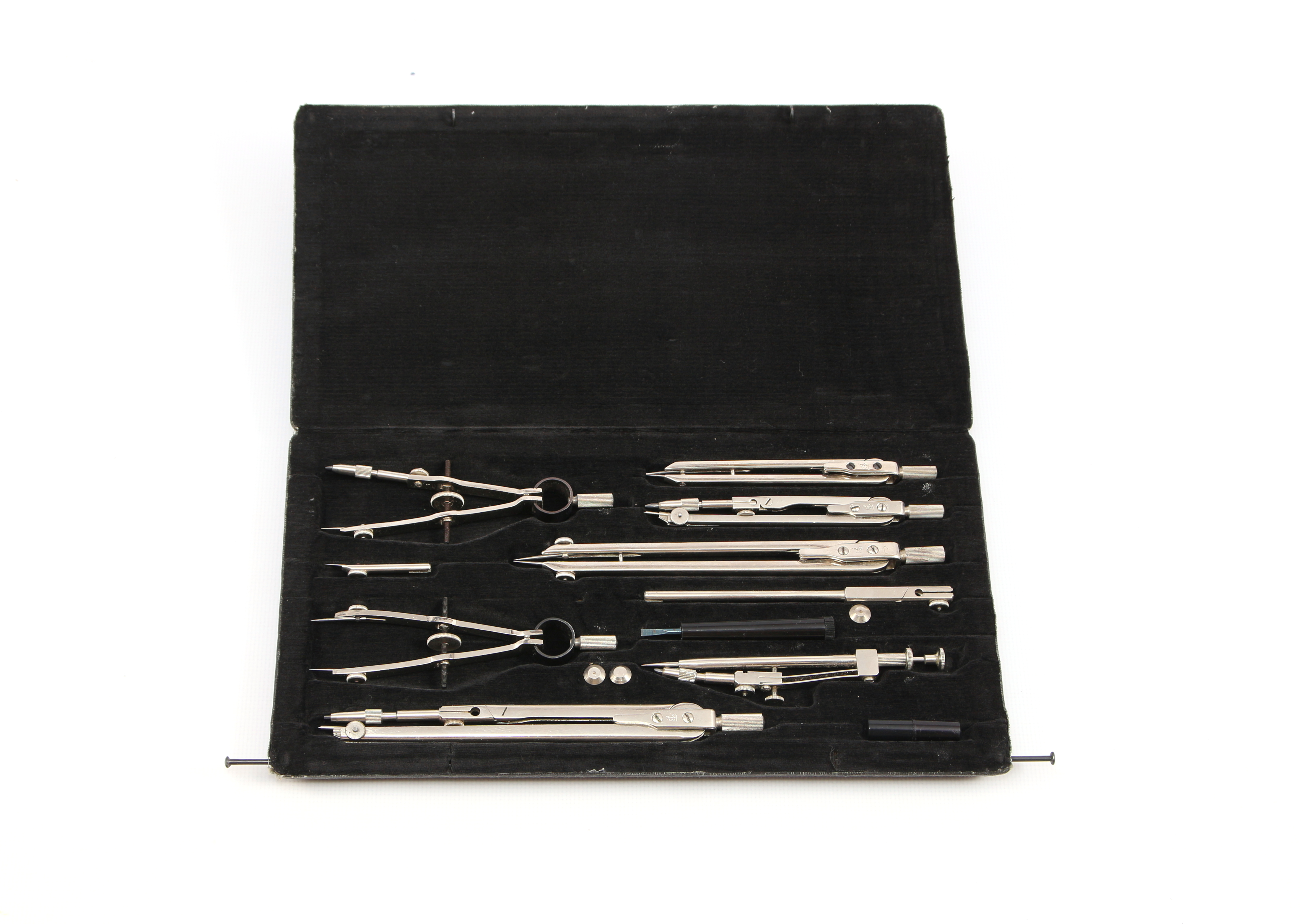 Готовальня КБ-Л, производства завода Готовальня г.Москва. Циркули изготовлены при помощи фрезеровки из латуни и покрыты хромом.